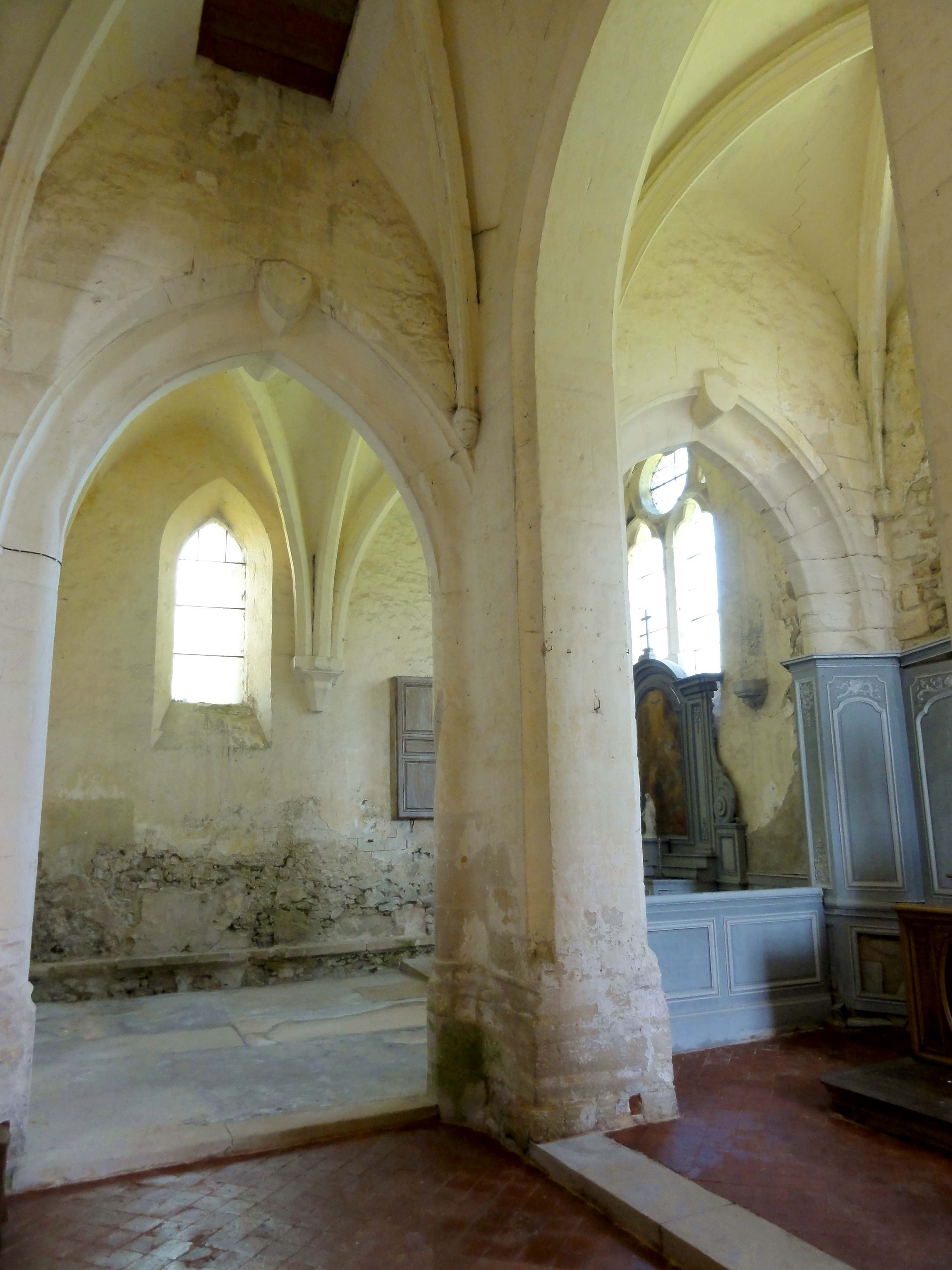 Intérieur de l'église (voir titre).